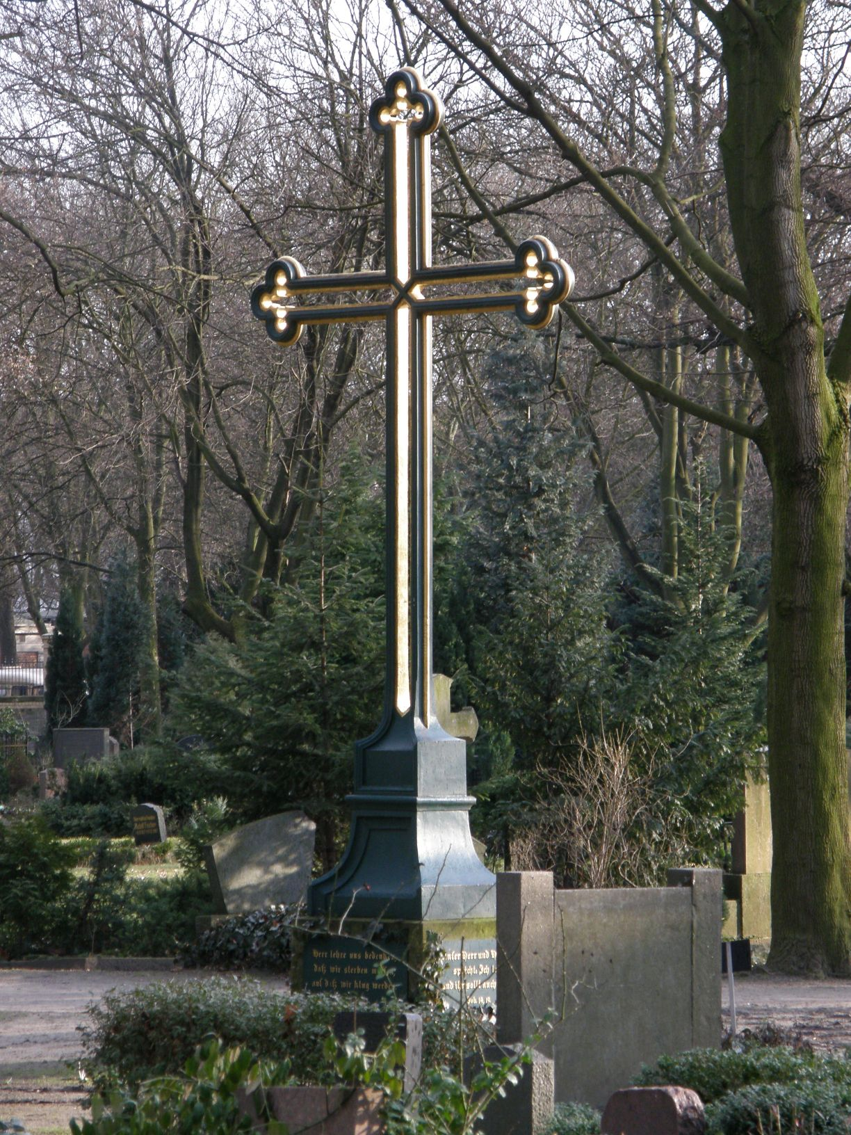 St. Elisabeth-Friedhof in Berlin. Wegkreuz.